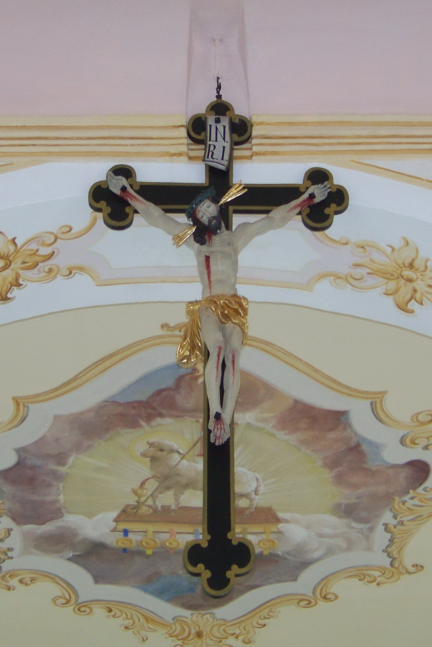 Bayerbach bei Ergoldsbach, Pram, Haus Nr. 9. Filialkirche St. Martin und Nikolaus. Saalkirche, von 1758. Barockes Kruzifix im Dreinageltypus auf einem Kleeblattkreuz im Chorbogen. Im Hintergrund ist das Deckengemälde im Chorraum mit dem apokalyptischen Lamm auf dem Buch mit seben Siegeln zu sehen.